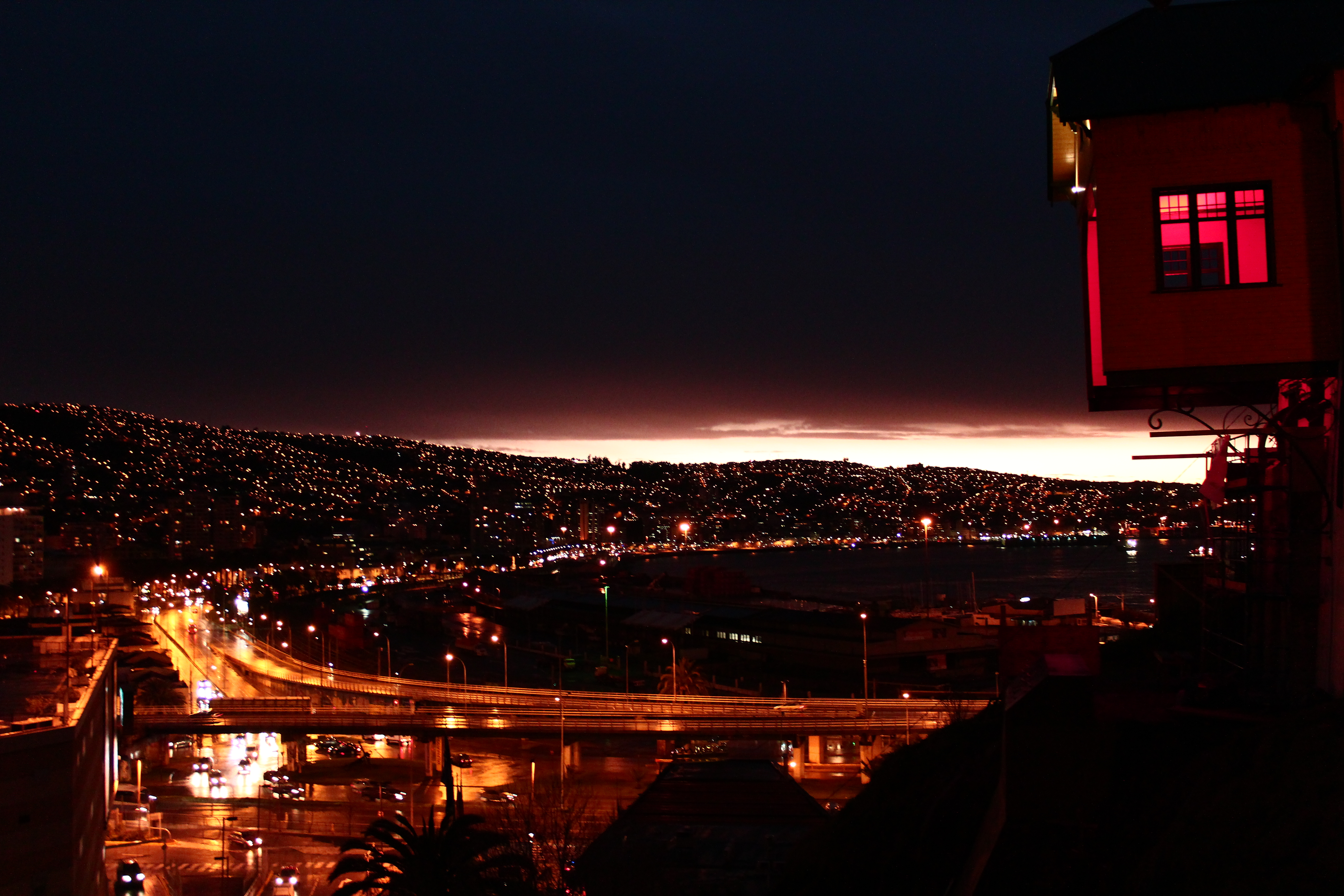 Ascensor Barón, Valparaíso, Chile This is a photo of a national monument in Chile: 766